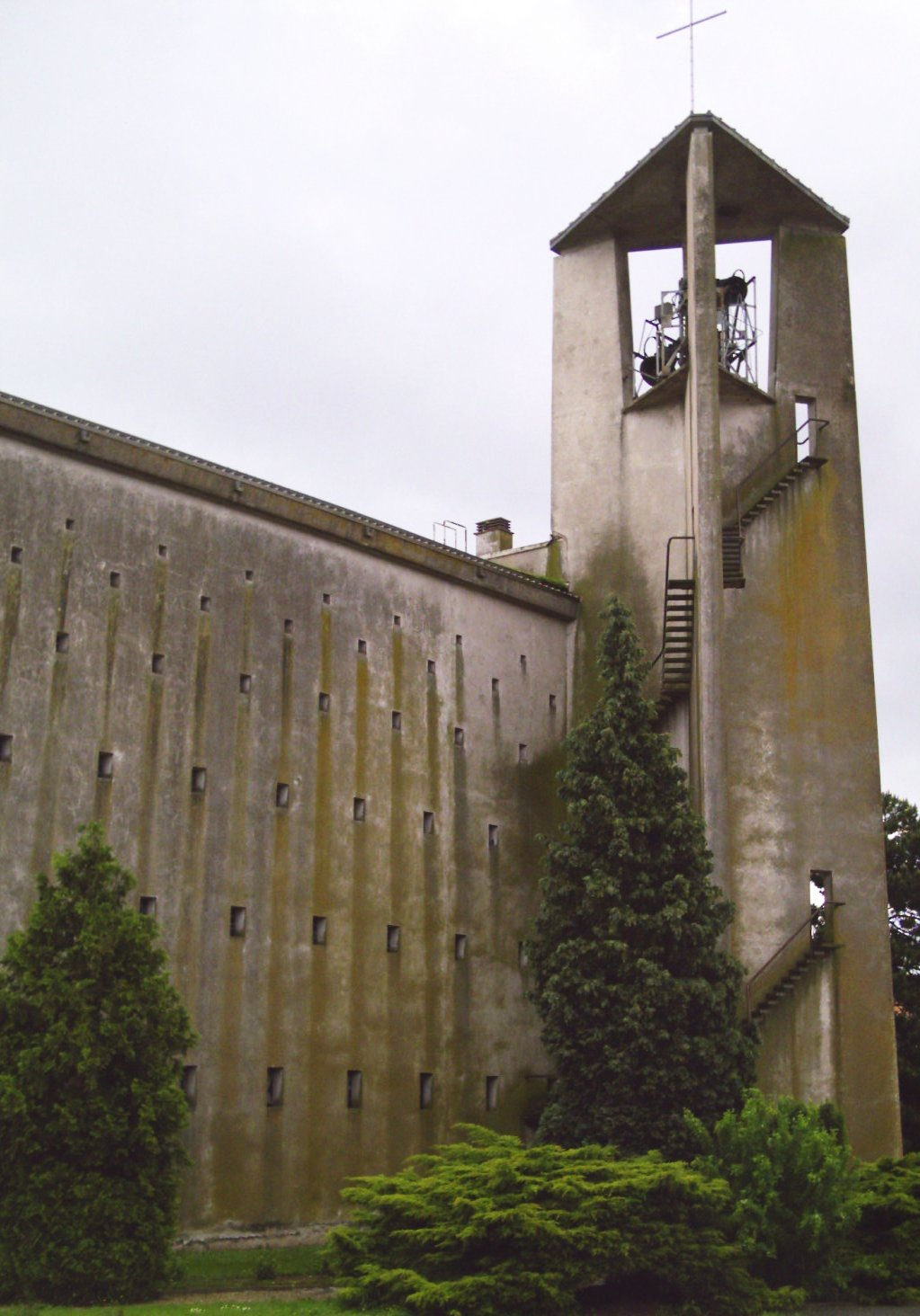 Moyenvic 57 France Eglise